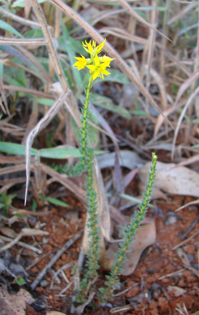 Cambessedesia espora (A.St.-Hil. ex Bonpl.)DC. - MELASTOMATACEAE - Parque Olhos D'Água - Brasília - Distrito Federal - Brasil.